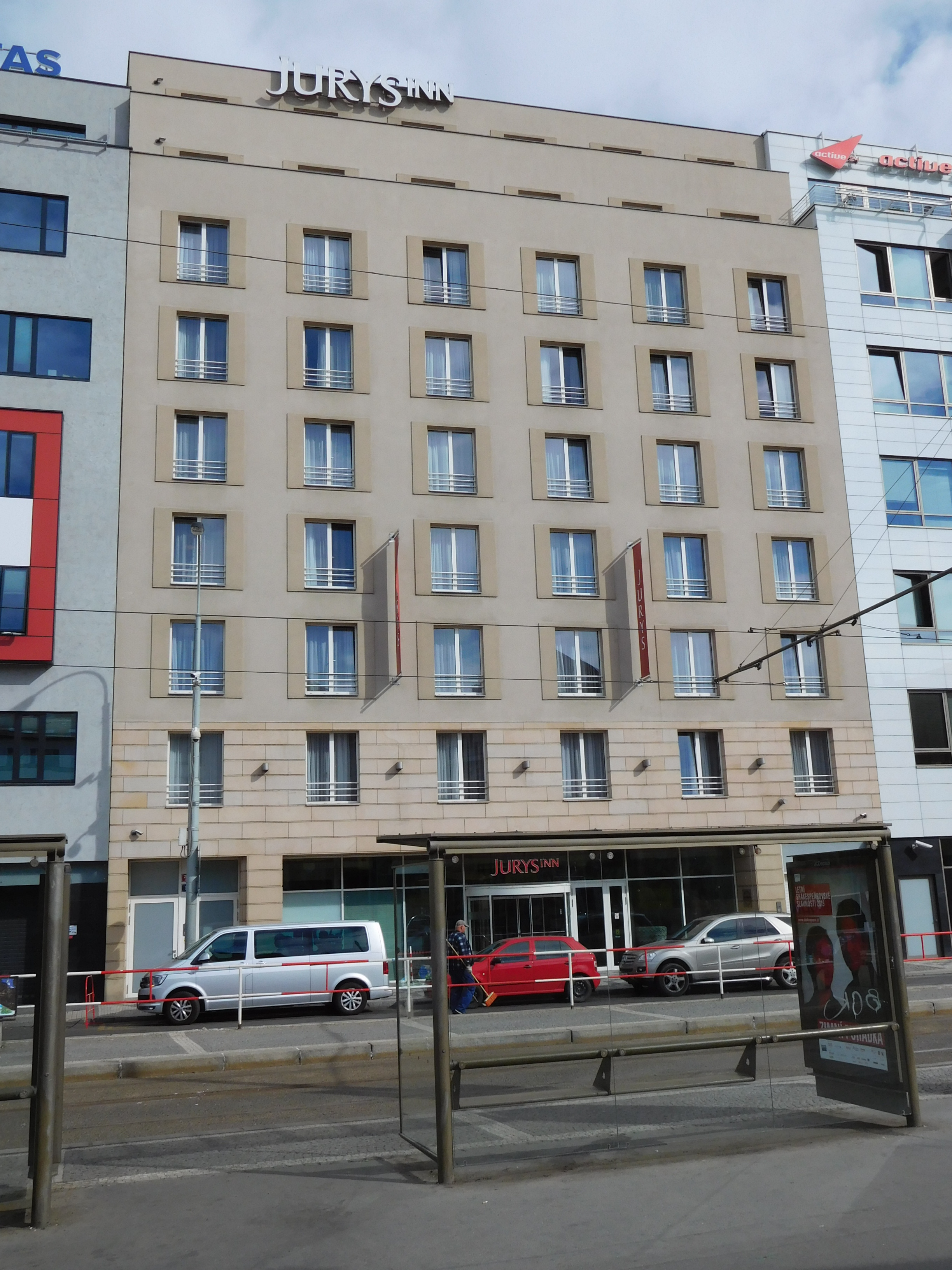 Praha - Karlín, Sokolovská 11, Jurys Inn